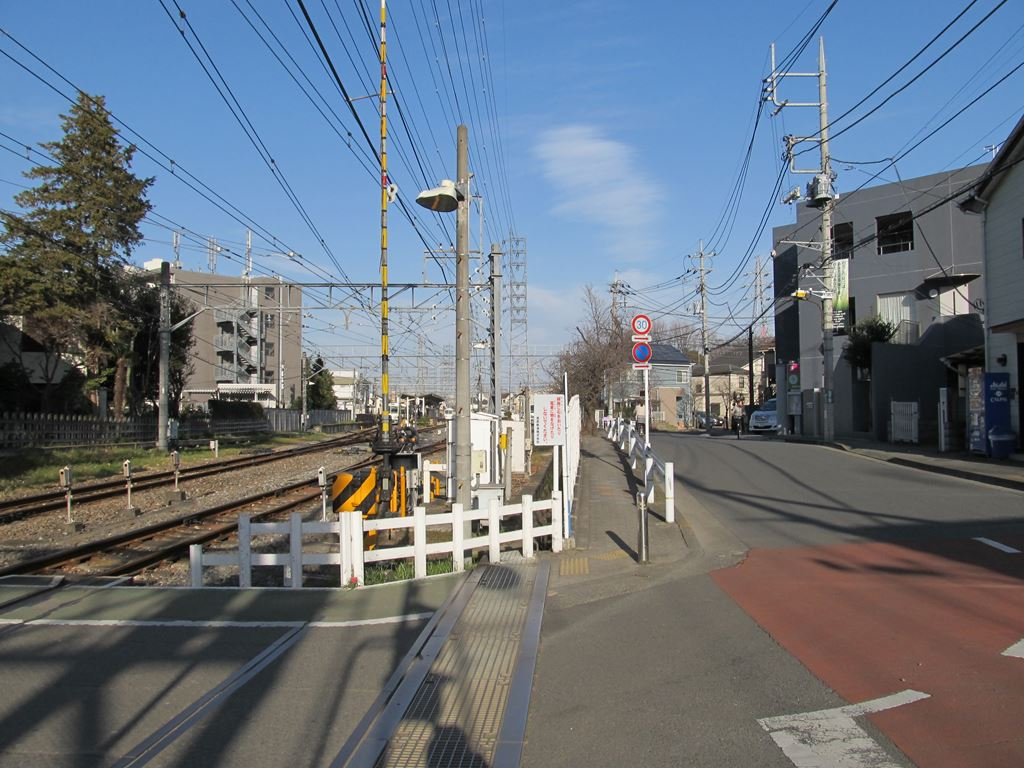 白糸台駅南踏切品川道。東京都府中市。